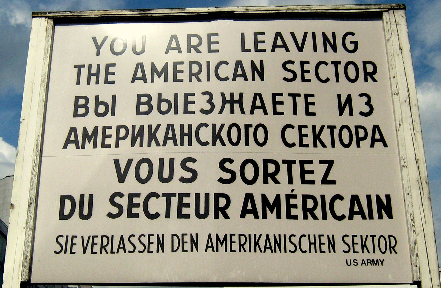 Schild zum Sektoren-Hinweis in Berlin 2009